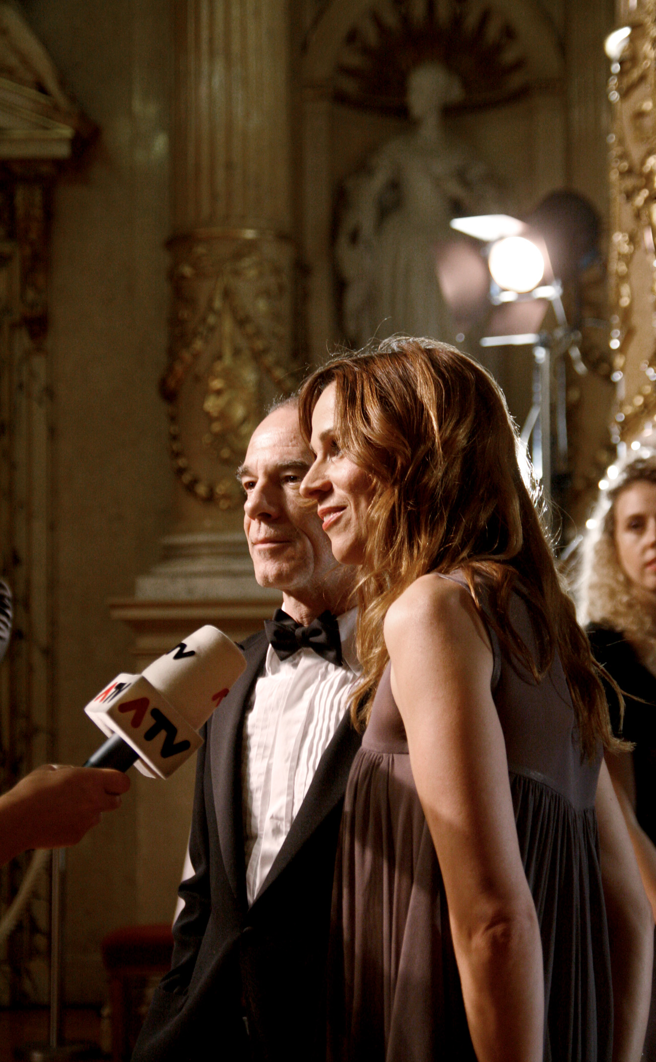 Doris Schretzmayer und Martin Wuttke (ausgezeichnet als bester Schauspieler) bei der Verleihung des Nestroy-Theaterpreises 2010 im Burgtheater in Wien.